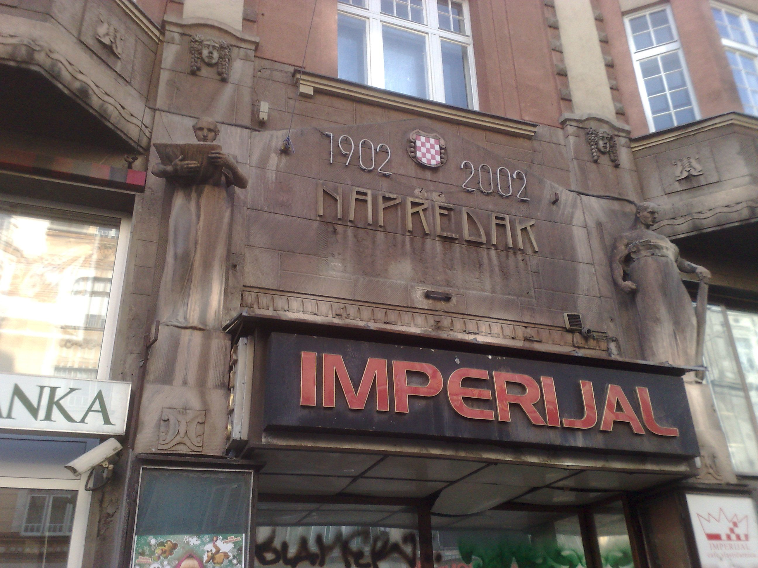 Zgrada društva Napredak